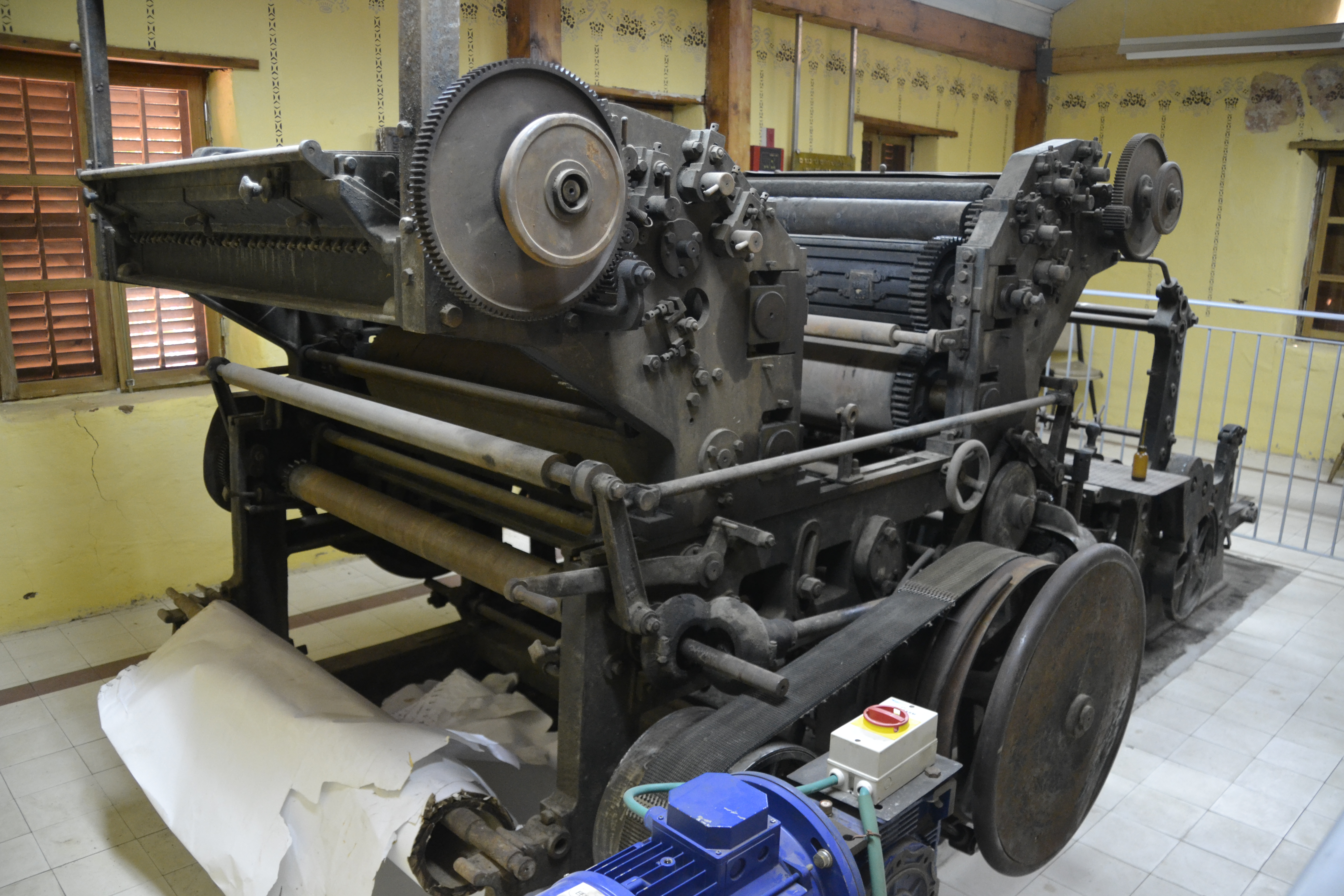 מכונת הדפוס המשוחזרת בבית הדפוס הראשון בפתח תקוה